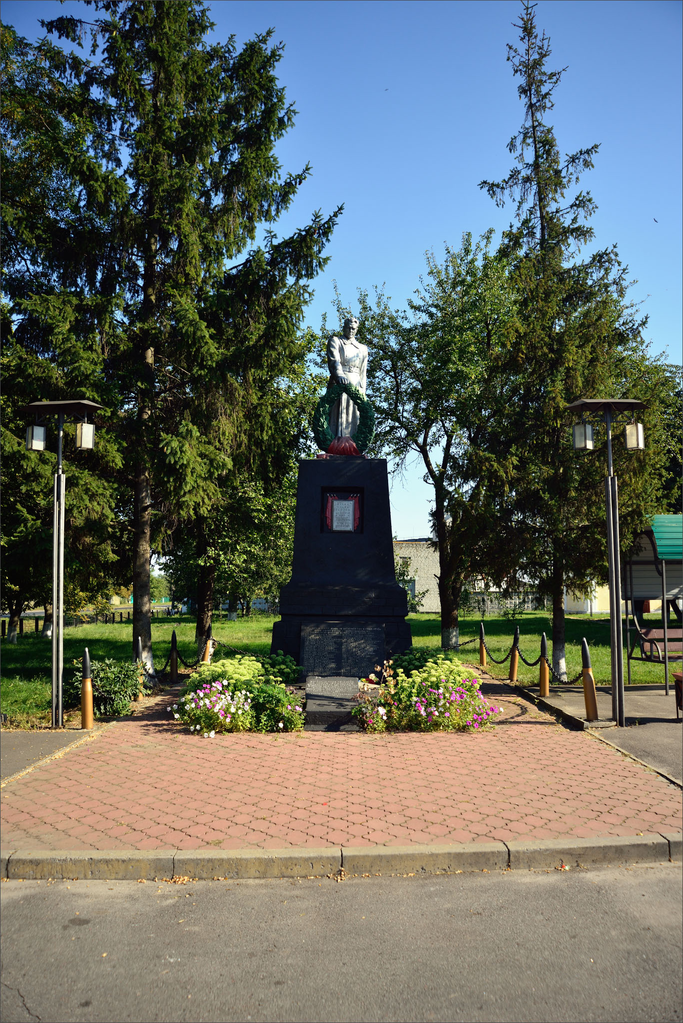 Братська могила партизанів, пам’ятник землякам, смт Гоголеве, залізничний вокзал, на площі